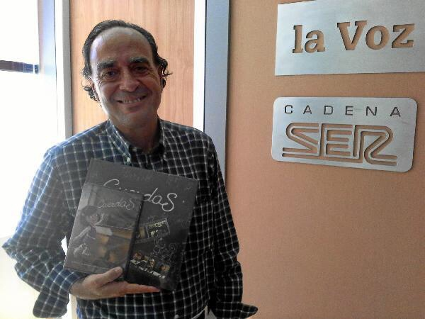 Jaime Martul posando con el libro de Cuerdas